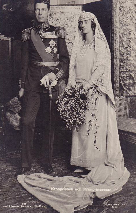 bröllopet mellan Gustav VI Adolf och Louise Mountbatten 3 november 1923 i Chapel Royal i St. James's Palace i London.